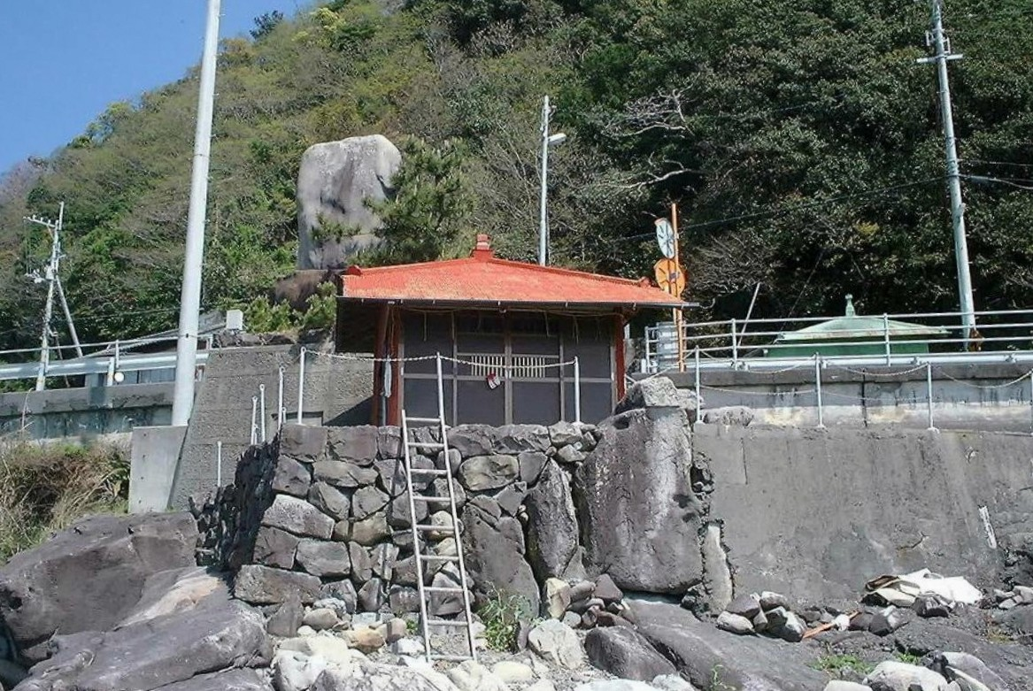 加領郷大師堂